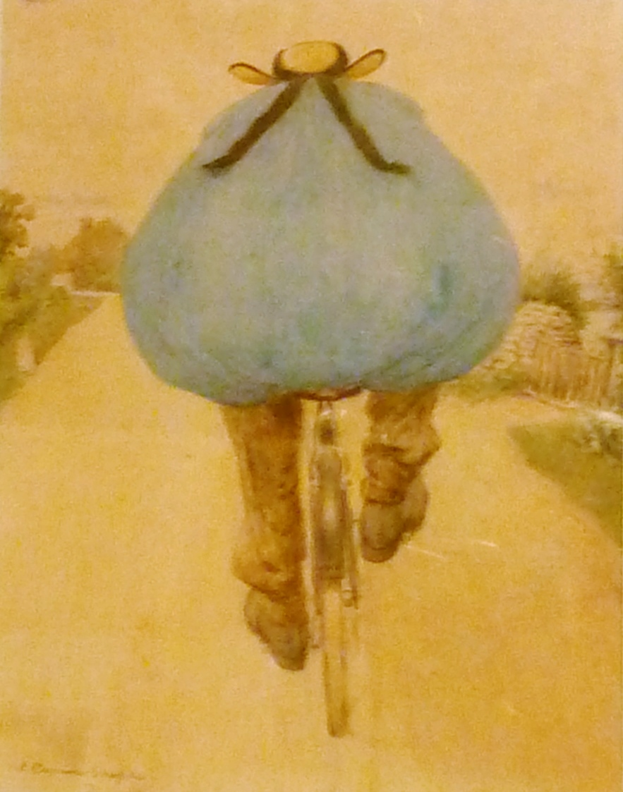 Sydney Curnow Vosper (1864-1942) : Un cultivateur mécanique (1906, aquarelle et carton, Musée du Faouët)